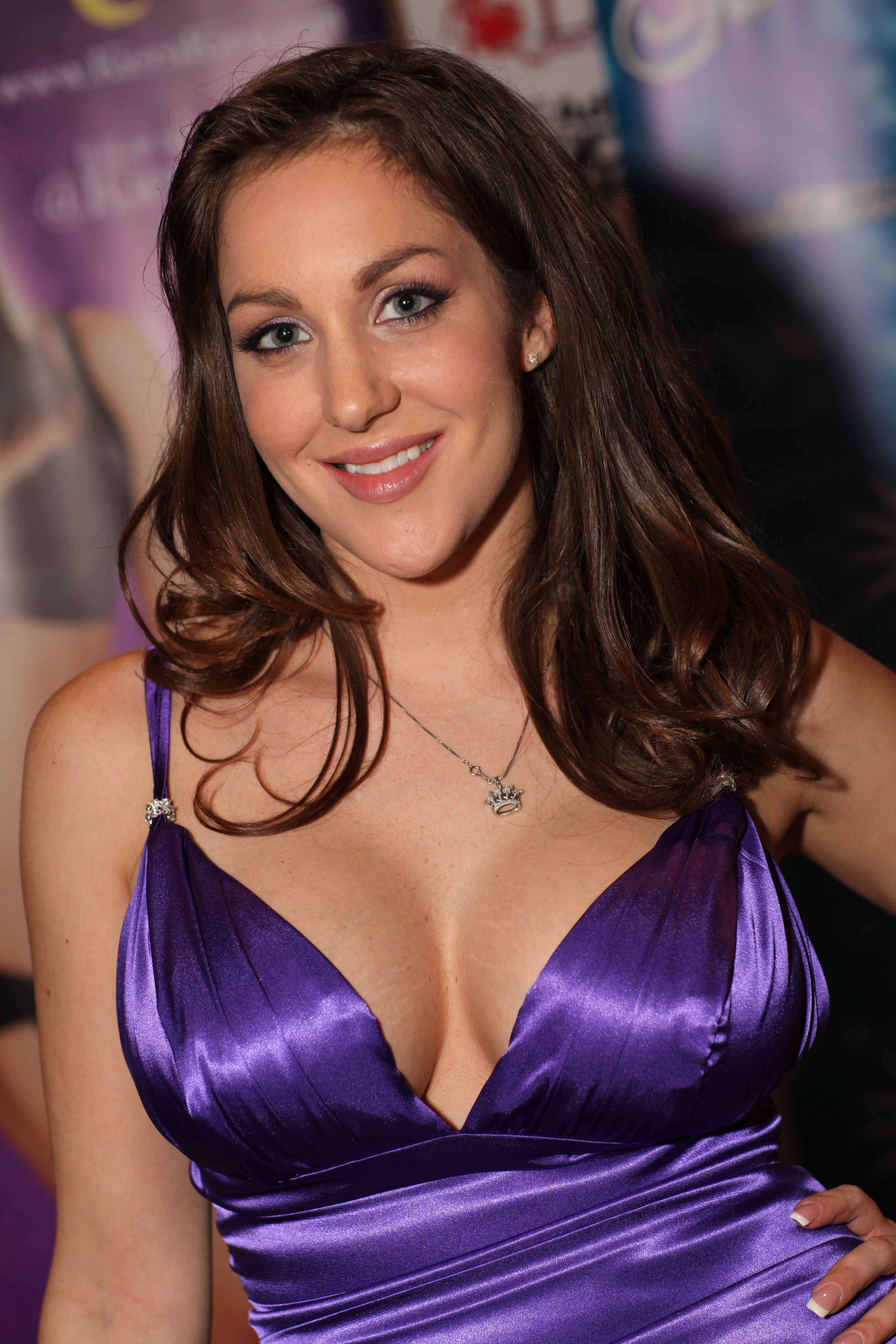 Kiera King AVN Adult Entertainment Expo 2013